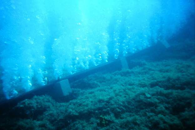 Unterwasseraufnahme vom Prototyp des Big Bubble Curtain